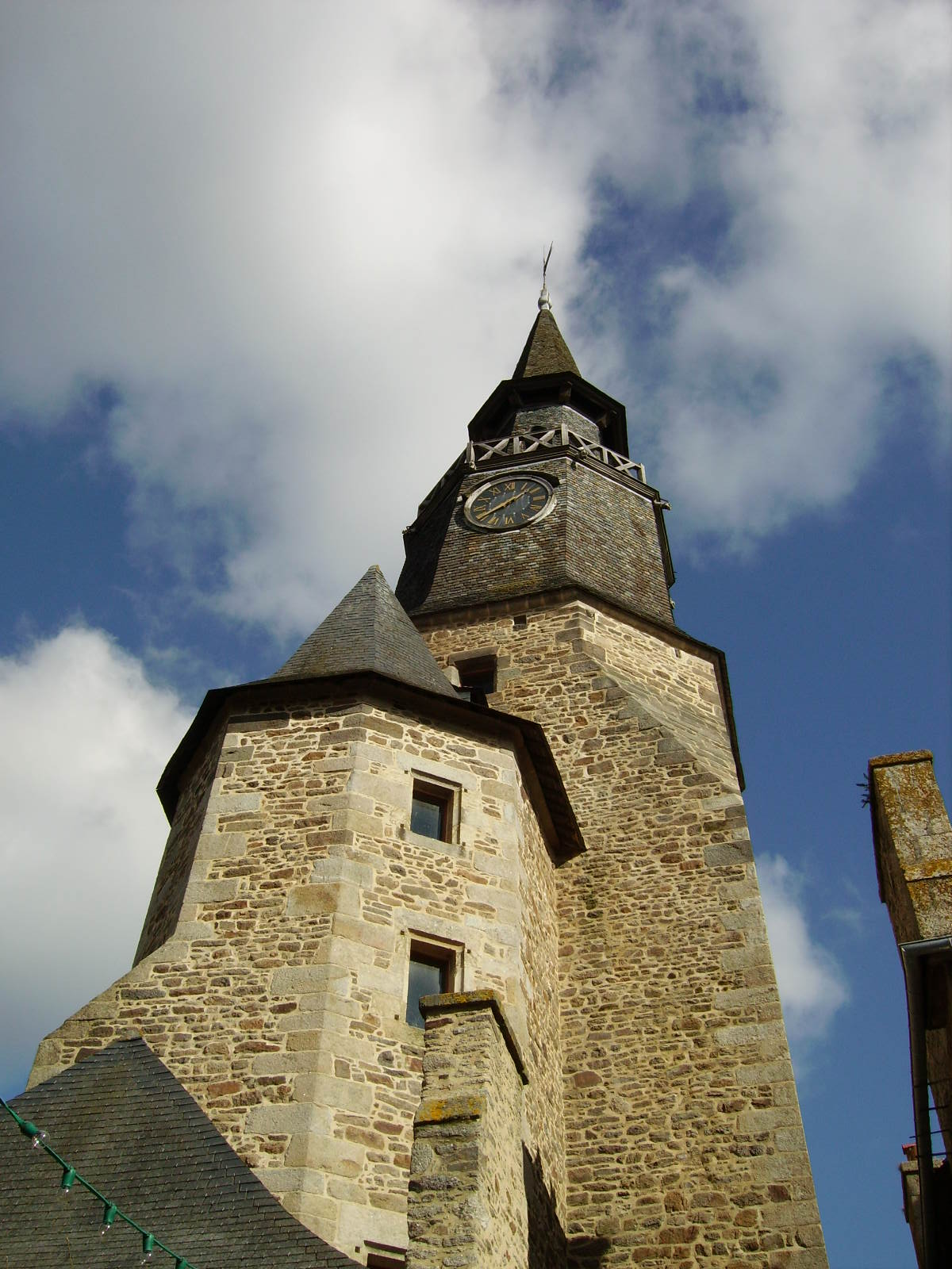 Horloĝturo de Dinan